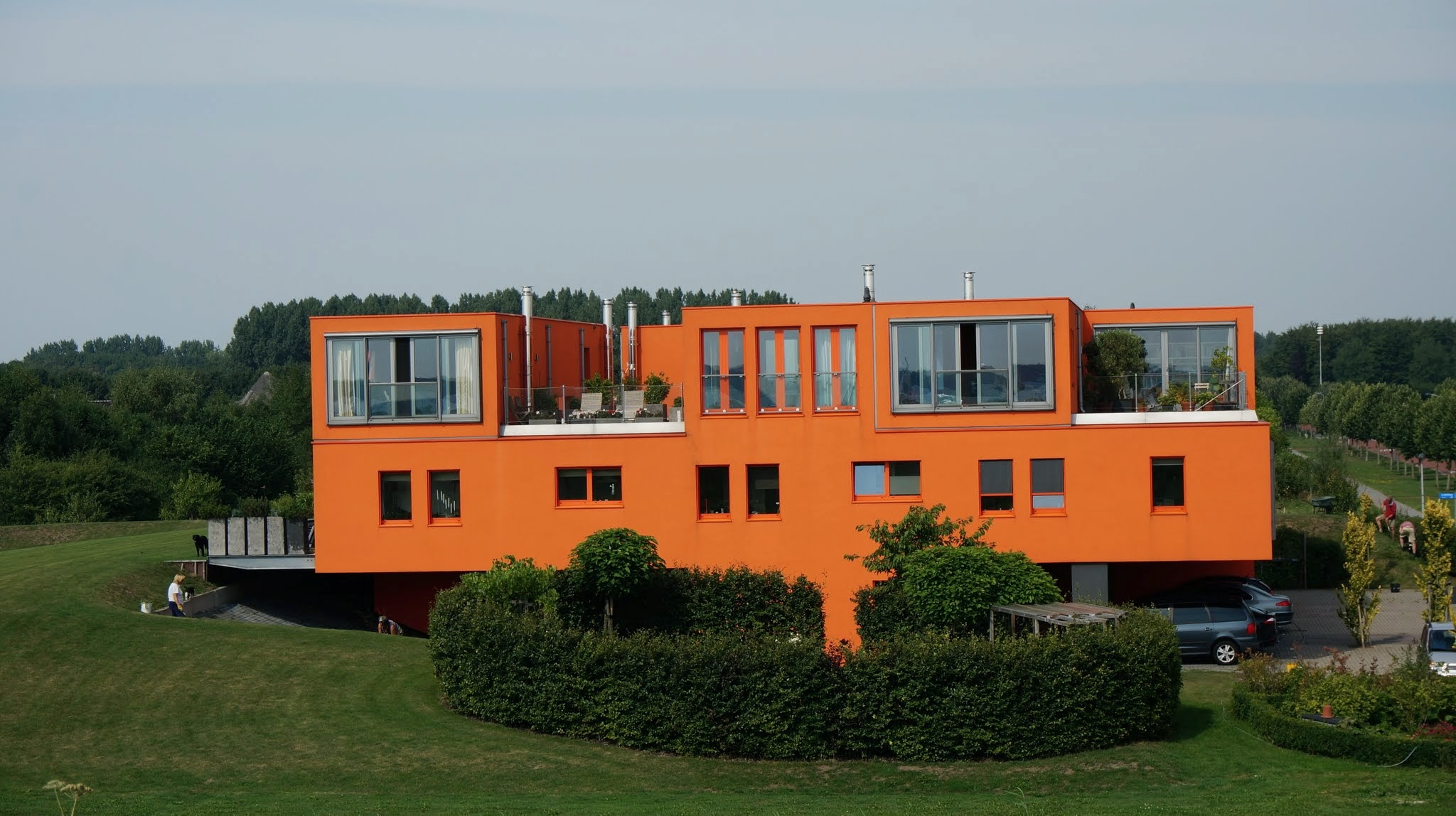 Overgooi, Almere, Netherlands